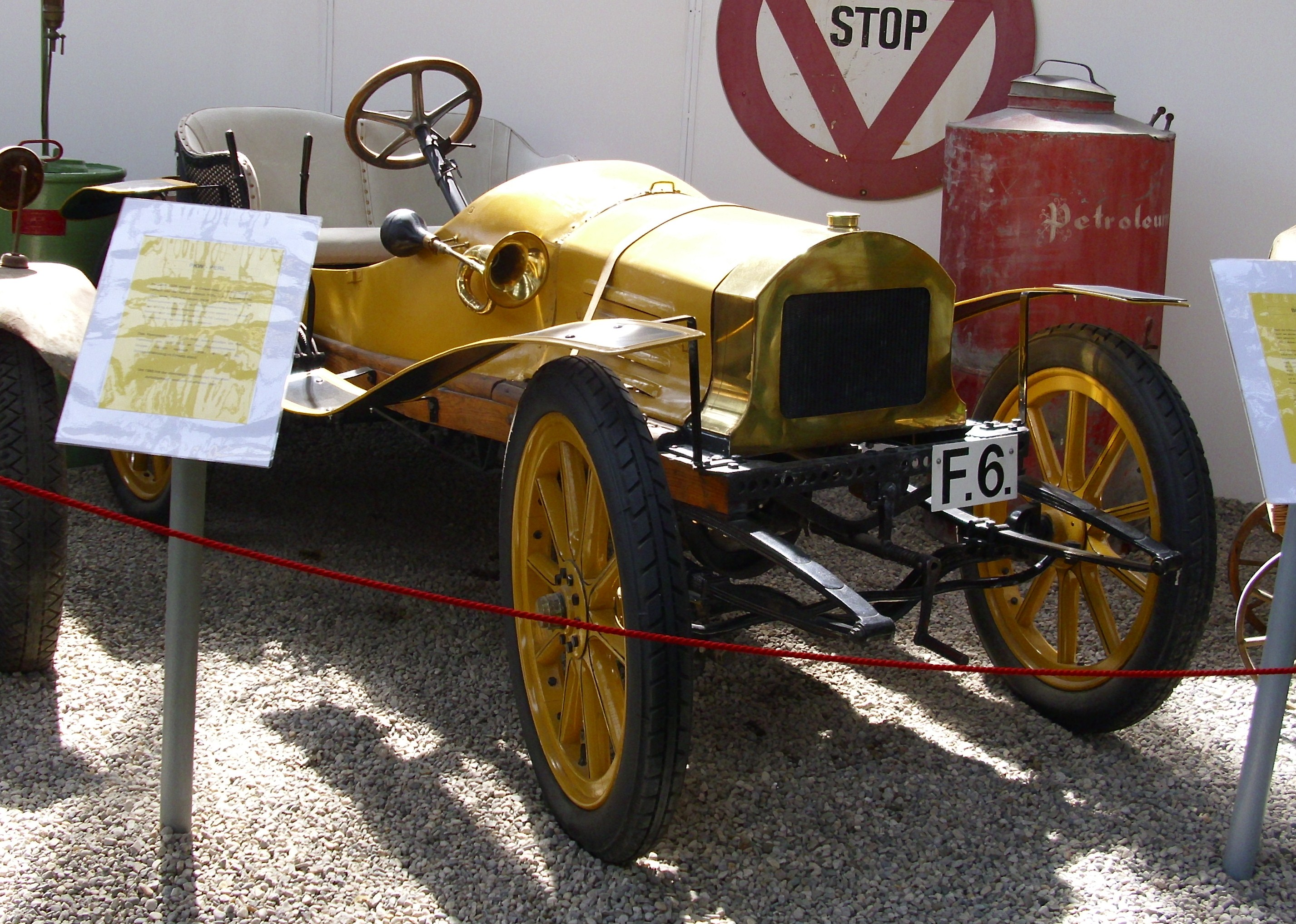 Bohrer von 1901 im Historama Ferlach